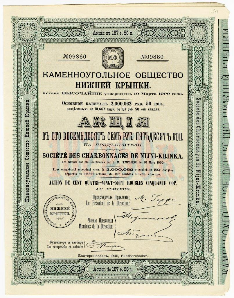 Акция в 187,5 руб. на предъявителя Каменноугольного общества Нижней Крынки с основным капиталом в 2 000 062,5 руб. Г. Екатеринослав, 1900 г.